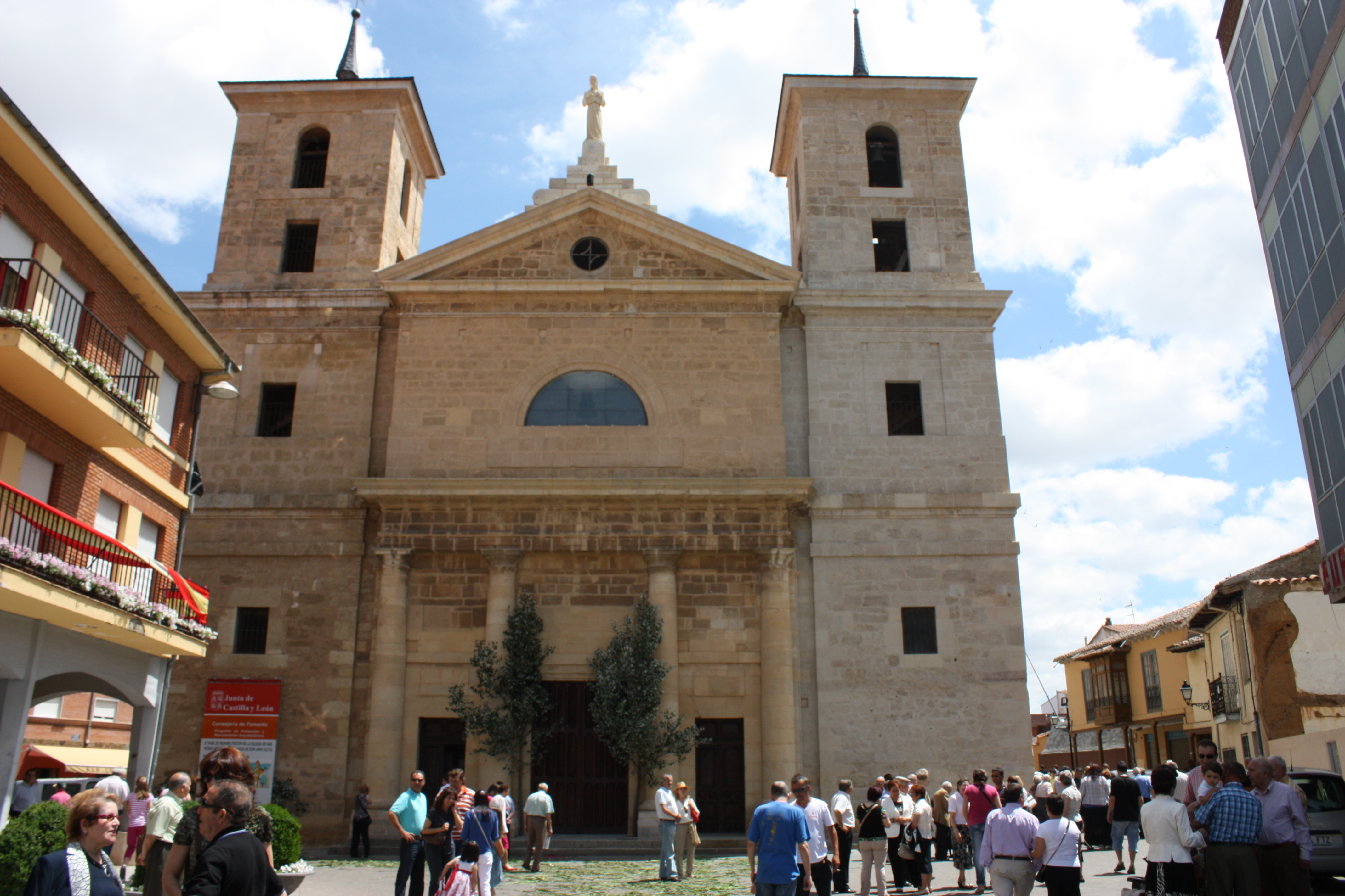 Parroquia de Valencia de Don Juan, obra del siglo XIX.